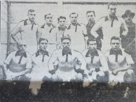 Équipe de l'Amiens Athlétic Club le 22 octobre 1933 à Amiens au stade Moulonguet avant un match de championnat de France D2 face au FC Rouen (victoire 2-1). Debout : ? Lemesre, André Lapierre, Adalbert Hawlick, Roland Balavoine, Robert Lesieur, Ernst Löwinger Accroupis : Louis Saint-Georges, Pierre Illiet, Otto Karpfel, Henri Ozenne, Georges Taisne